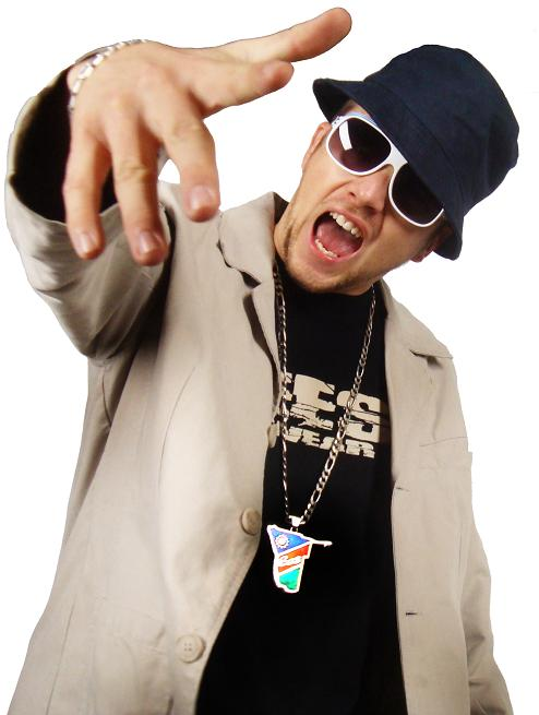 Eesy Eric Sell